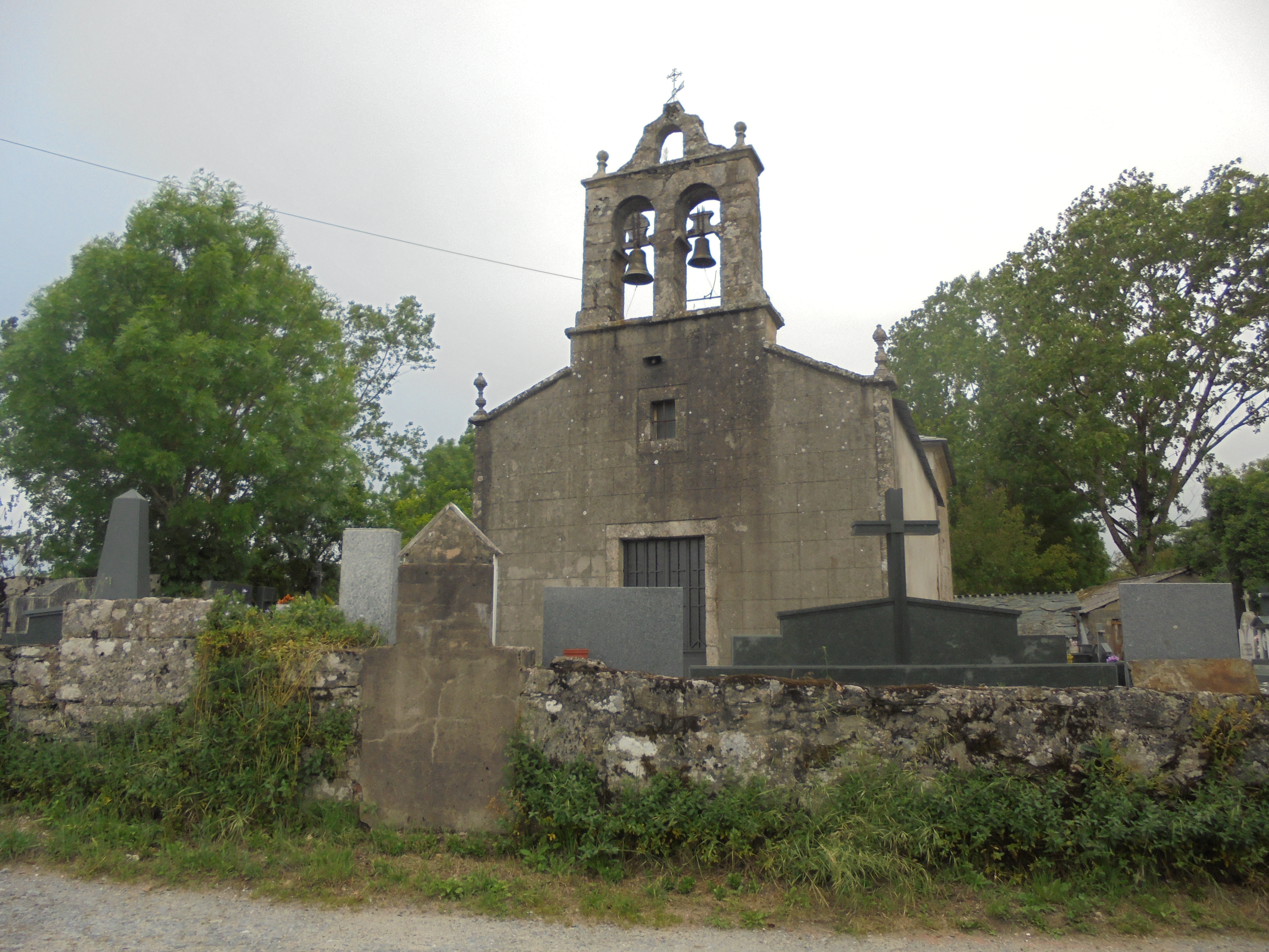 Igrexa parroquial de San Cristovo de Chamoso ( O Corgo)